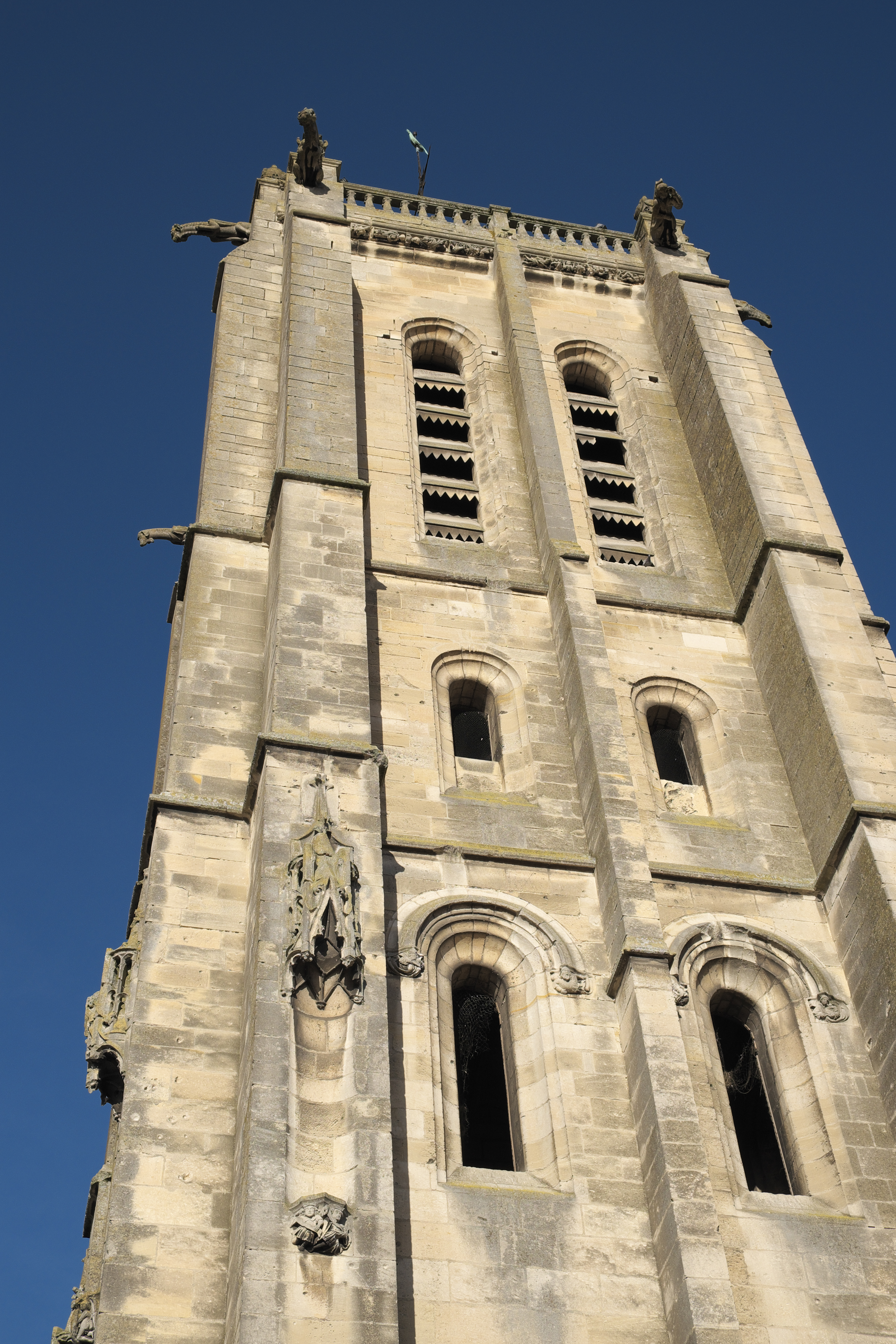 Katholische Pfarrkirche Saint-Laurent in Beaumont-sur-Oise im Département Val d'Oise (Île-de-France/Frankreich), Glockenturm aus dem 16. Jahrhundert